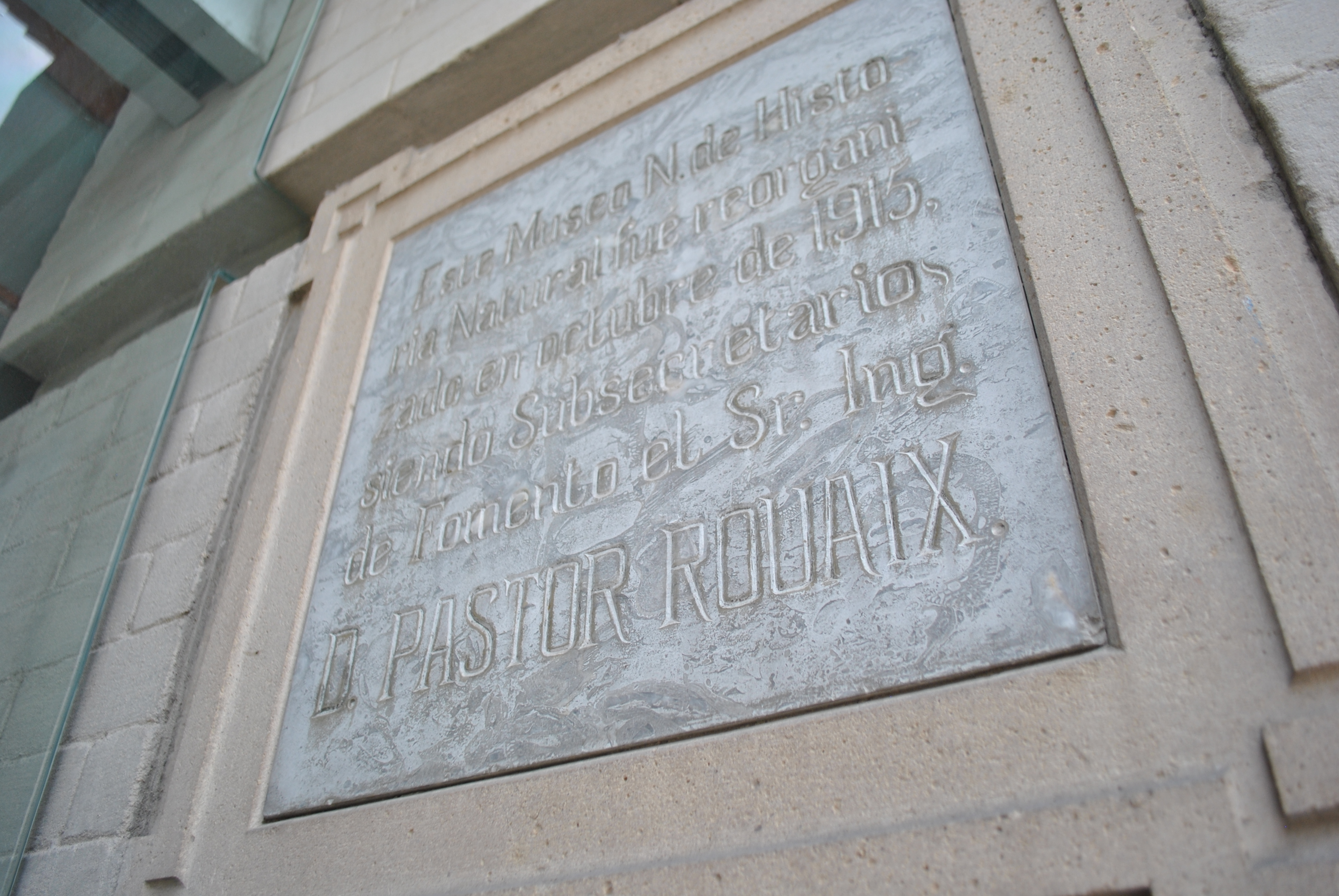 Al exterior del recinto.